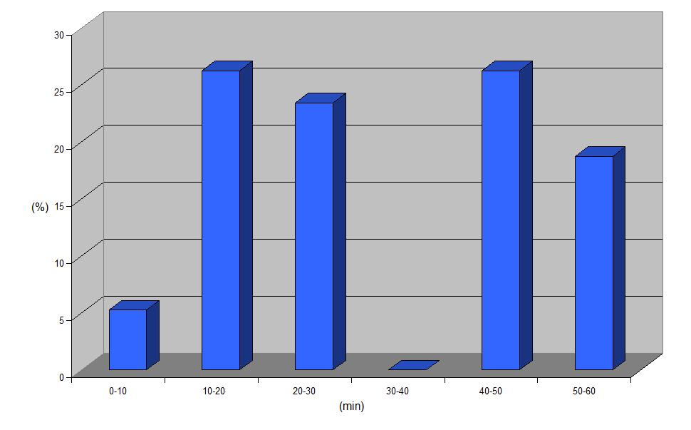 Durée du trajet domicile-travail à Morrison (Colorado, Etats-Unis) en 2010.